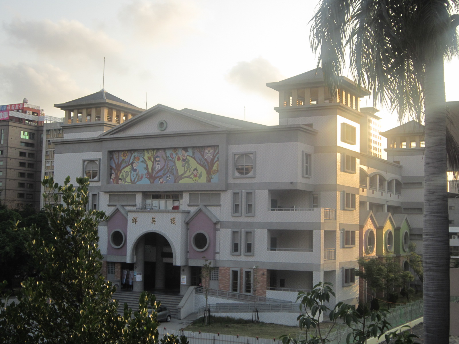 五福國中群英樓